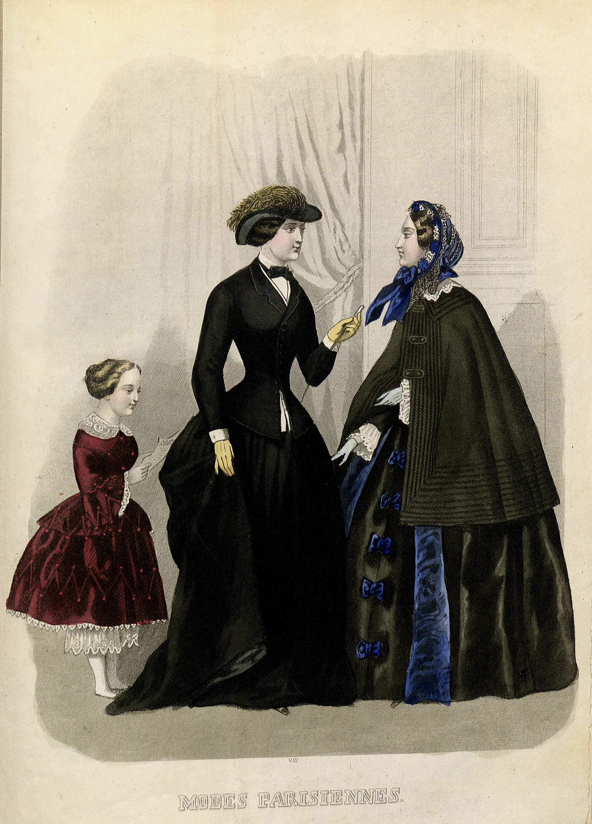 Ridkläder; Chemisett; Halsduk; Hatt; Plymer; Promenadklänning; Band; Kappa; Spets; Blommor; Barnkläder; Pantalonger